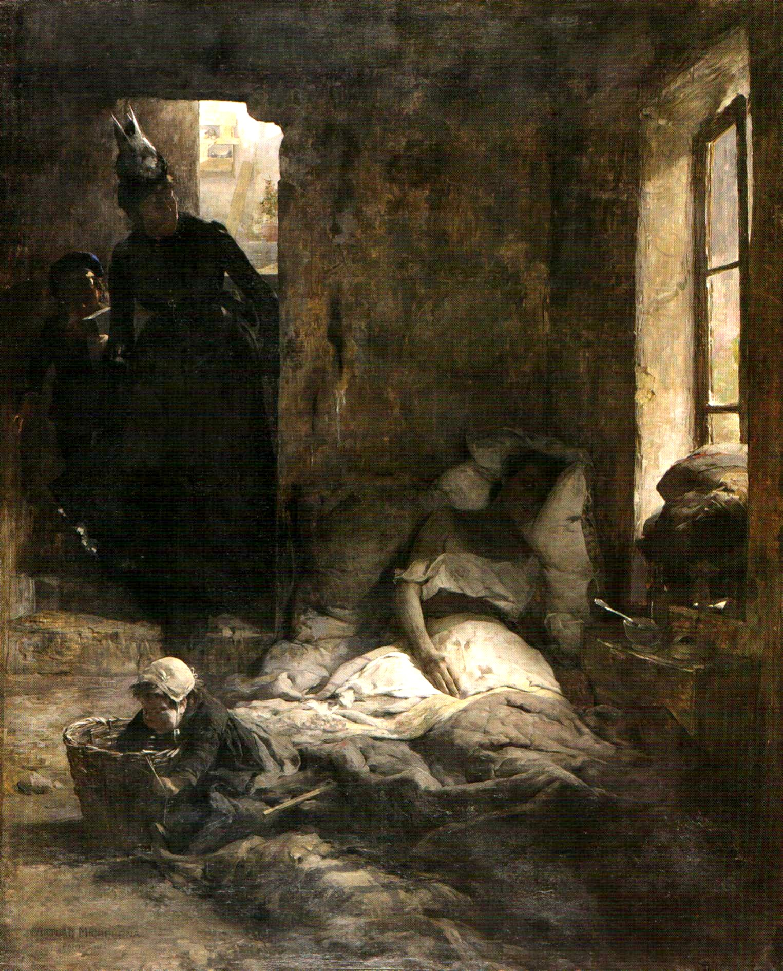 La caridad.